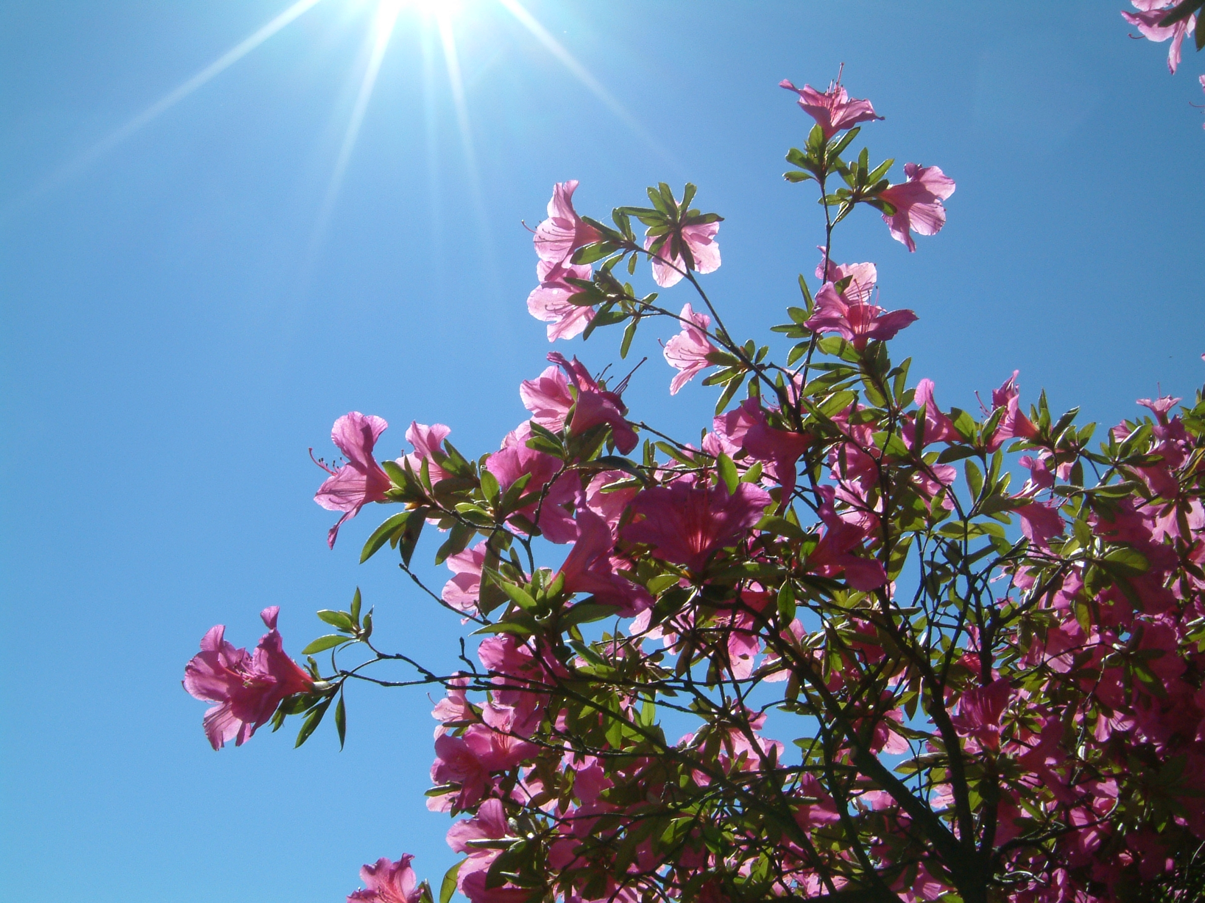 azalee bush